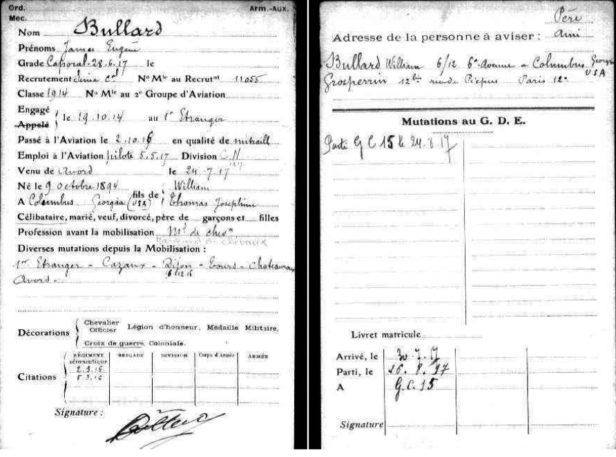 Bullard James Eugene, Base des Personnels de l'aéronautique militaire, Secrétariat Général pour l'Administration, Ministère de la Defence, France, 1914-1917.